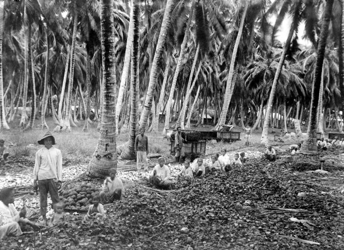 Negatief. Kokosnootschillers op een plantage op de Cocos of Keeling eilanden